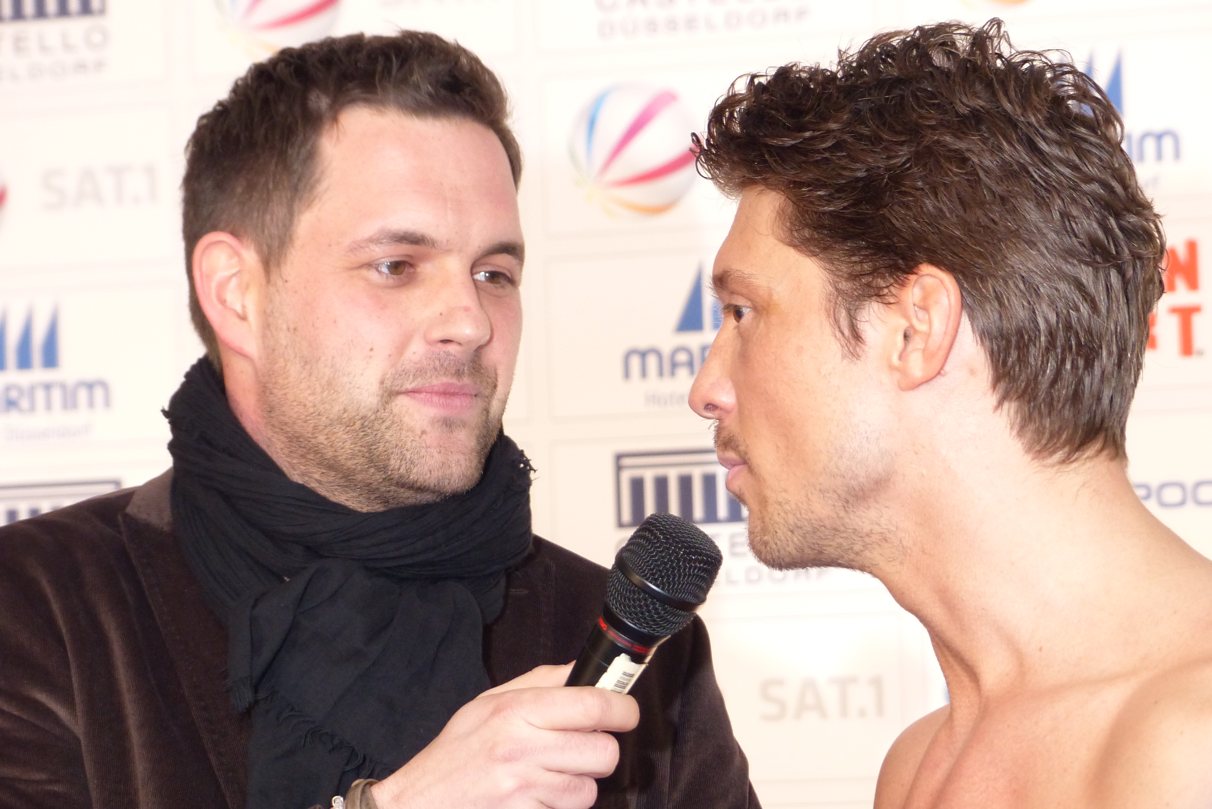 Matthias Killing im Interview mit Sebastian Deyle, offizielles Wiegen, Promiboxen 2013